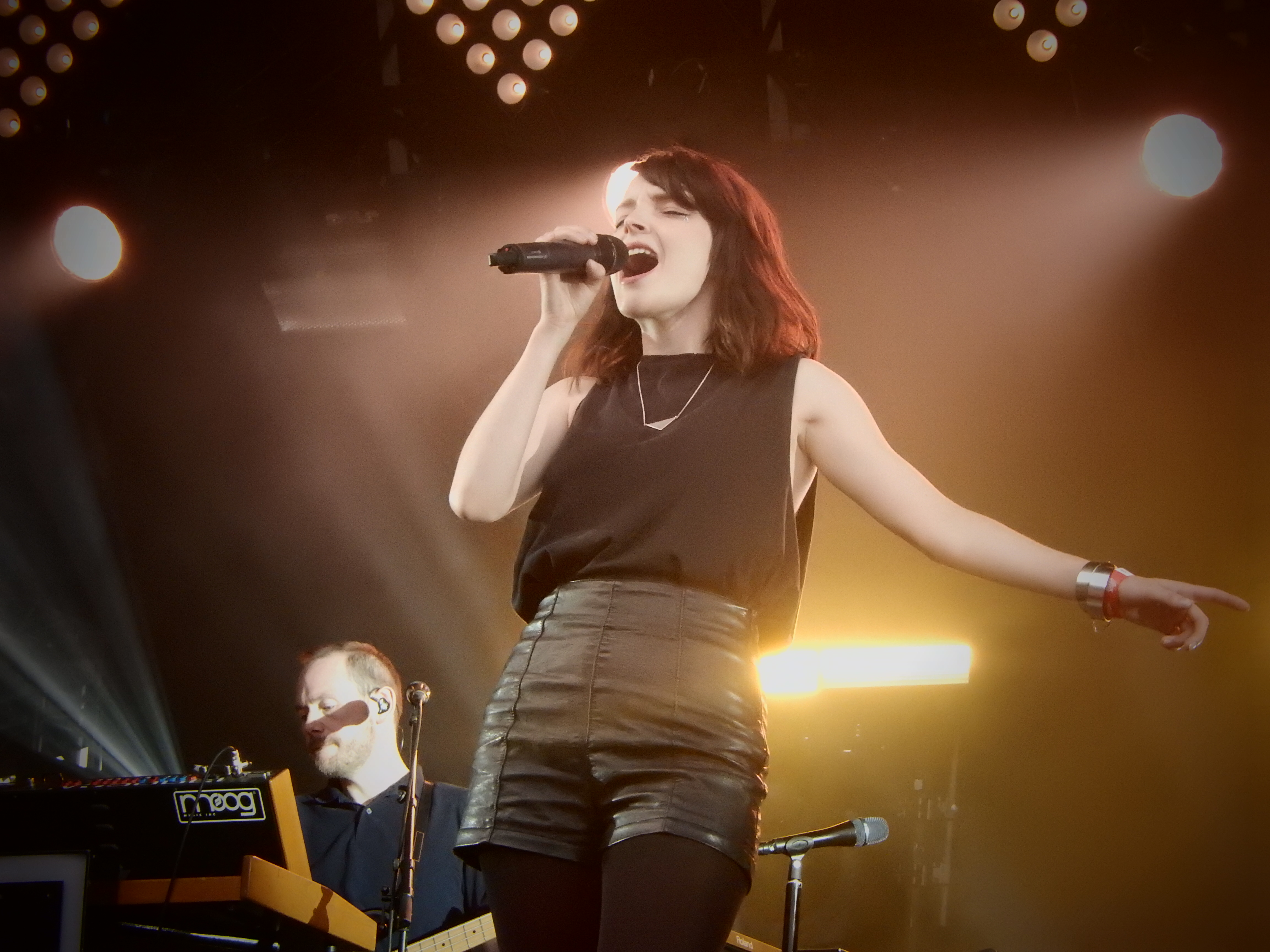 Chvrches, Rock en Seine 2016, Paris